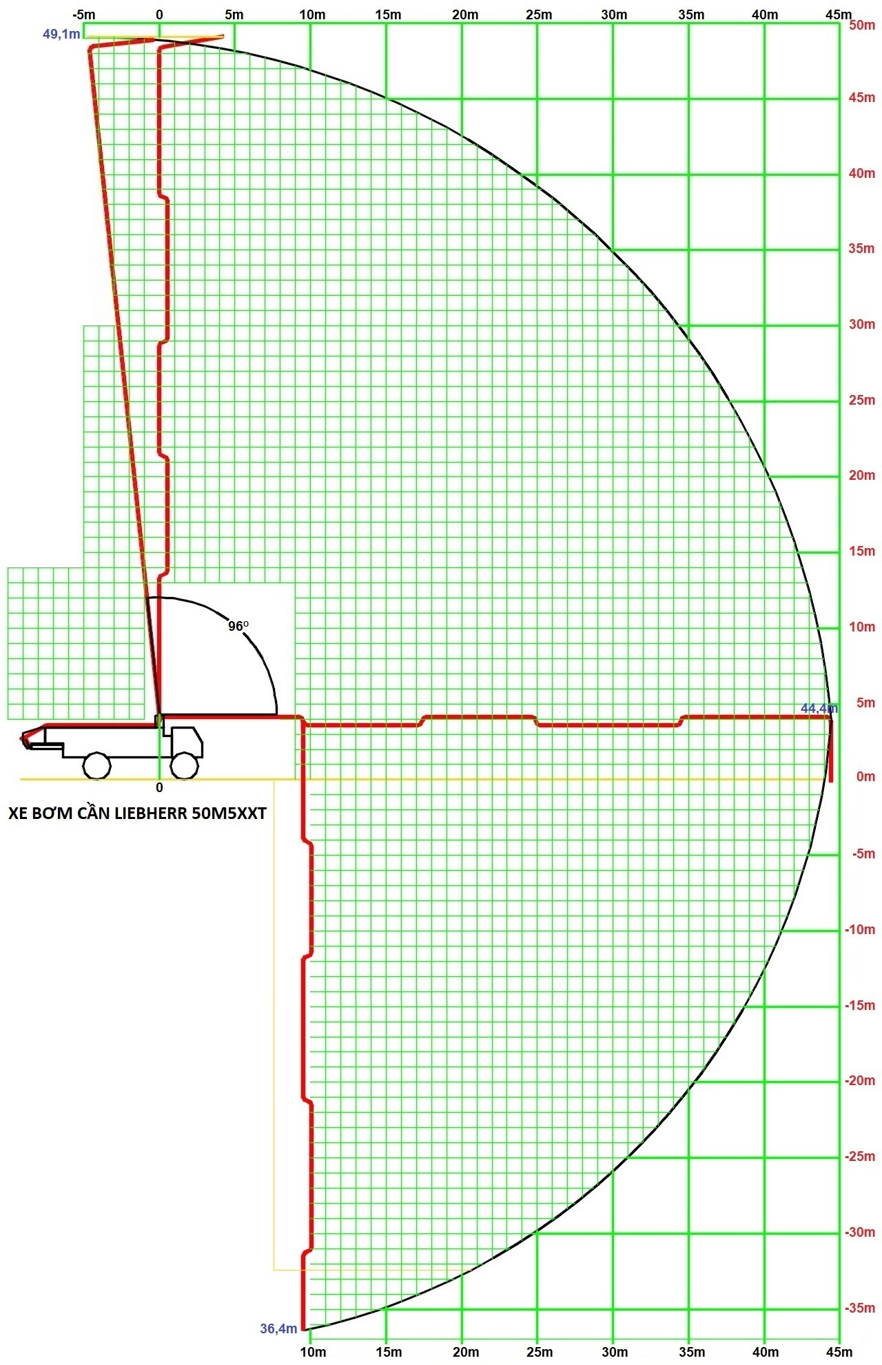 Biểu đồ tính năng không gian phục vụ bơm bê tông của xe bơm cần Liebherr 50M5XXT. Tham khảo trang